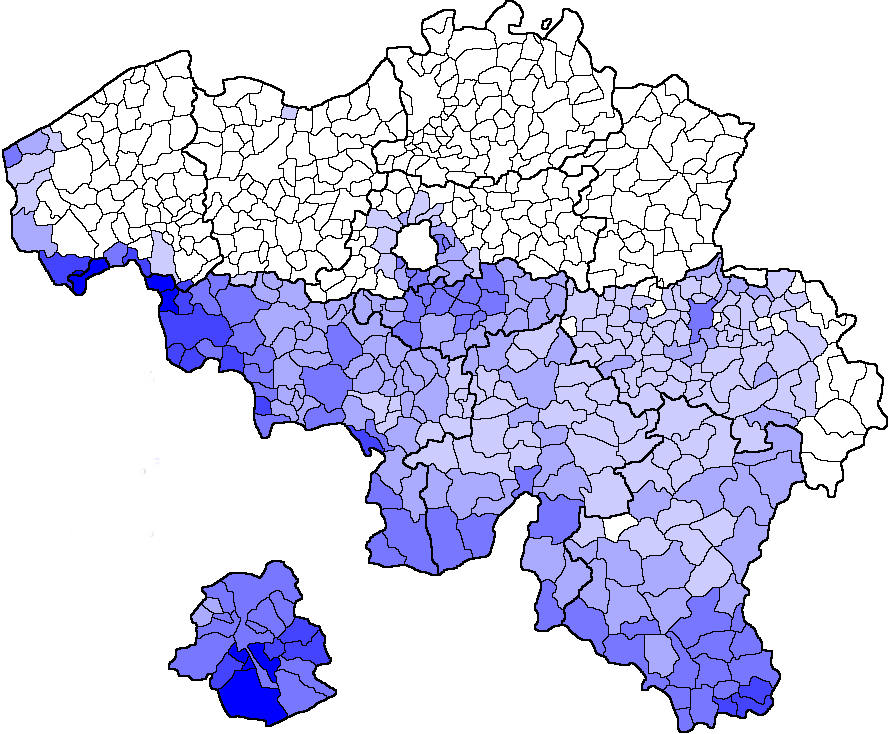 Deze kaart toont per gemeente welk percentage van de bevolking van die gemeente uit Fransen bestaat. Gegevens uit het .xls-bestand "Bevolking naar nationaliteit en geslacht per gemeente" op statbel.be. Legenda: 10%